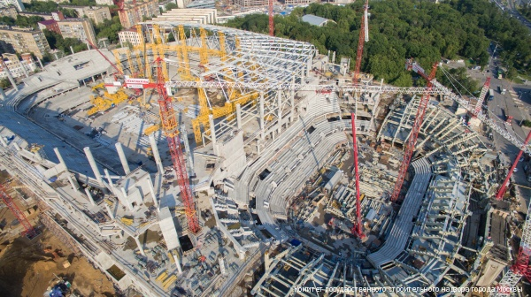 Реконструкция стадиона «Динамо» (июль 2016)